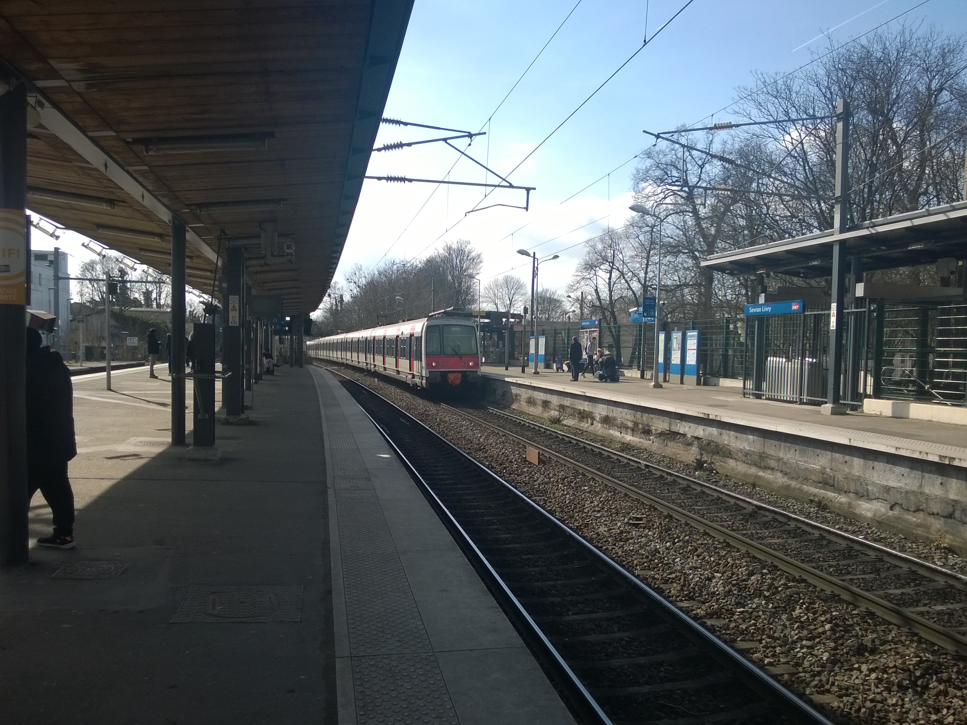 Une unité multiple vers Mitry - Claye entre en gare de Sevran - Livry.